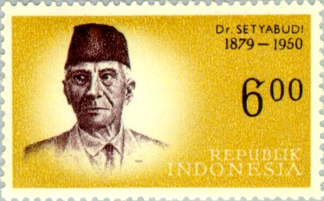 Ernest Douwes Dekker